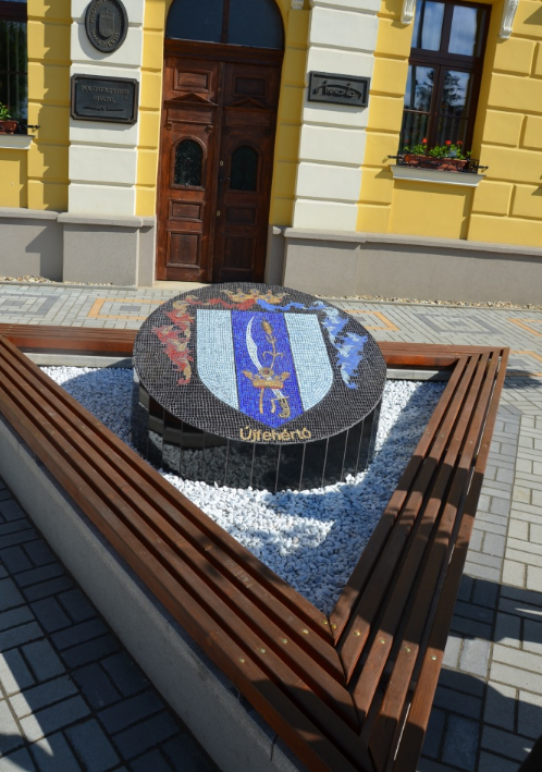 A város címere egy üvegmozaik alkotáson